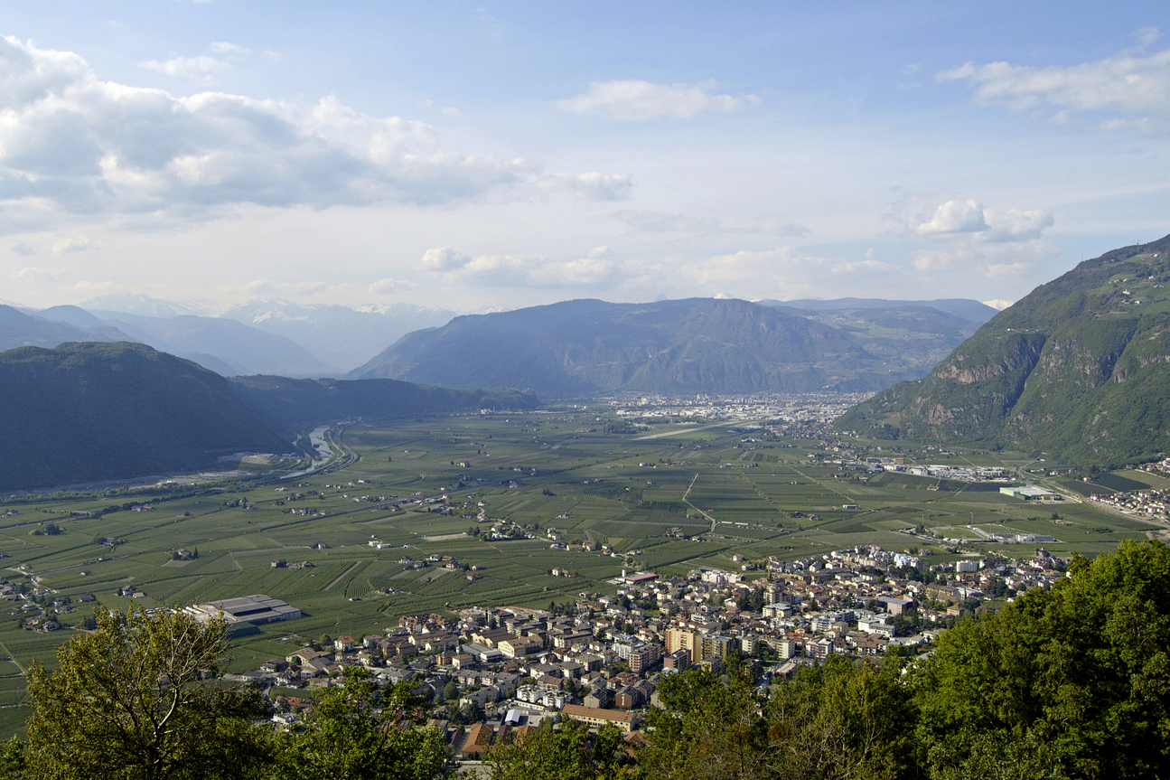 Leifers mit Blick in Richtung Bozen (Bildmitte).